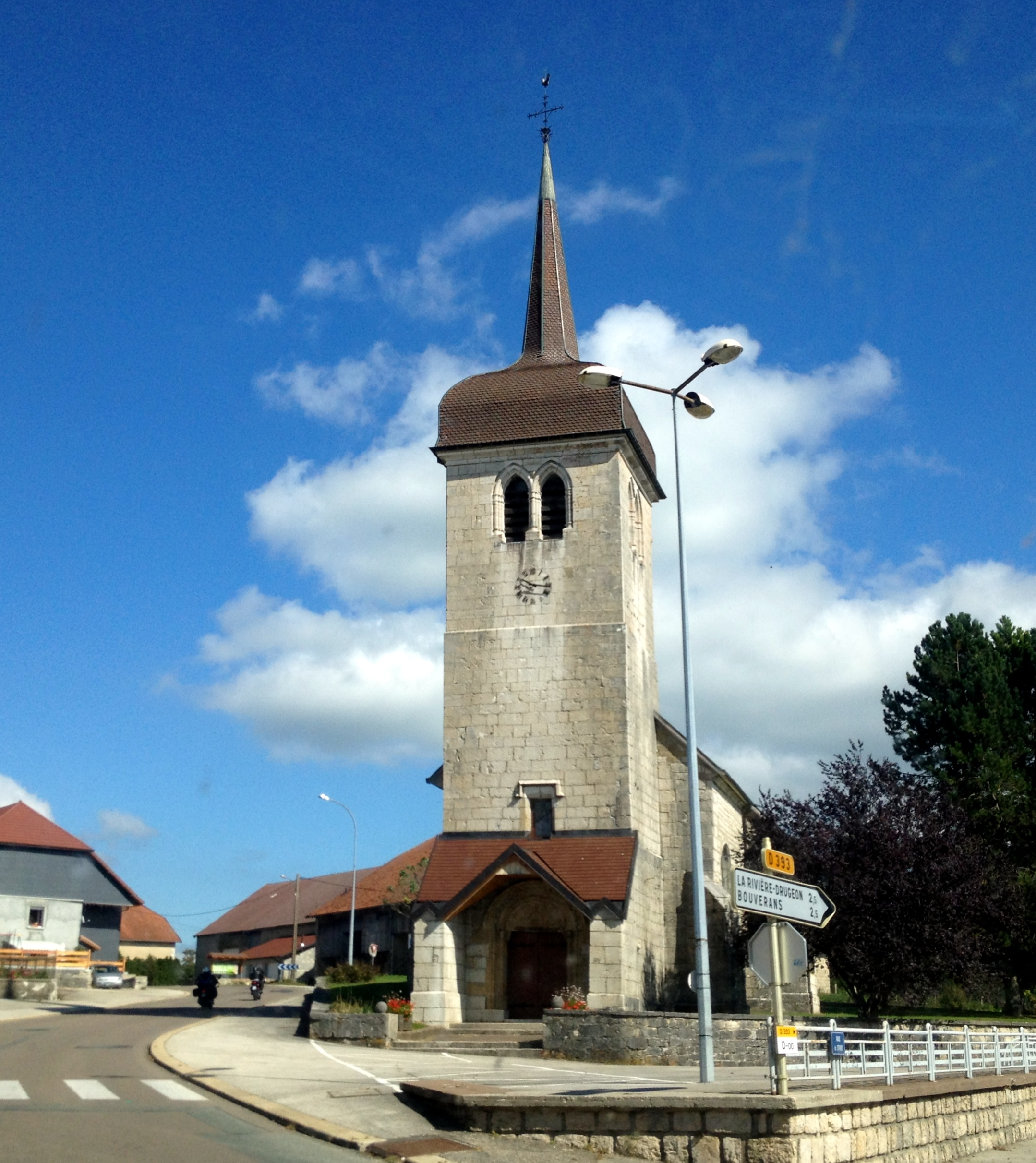 Église Saint-Pierre et Saint-Paul de Dompierre-les-Tilleuls.